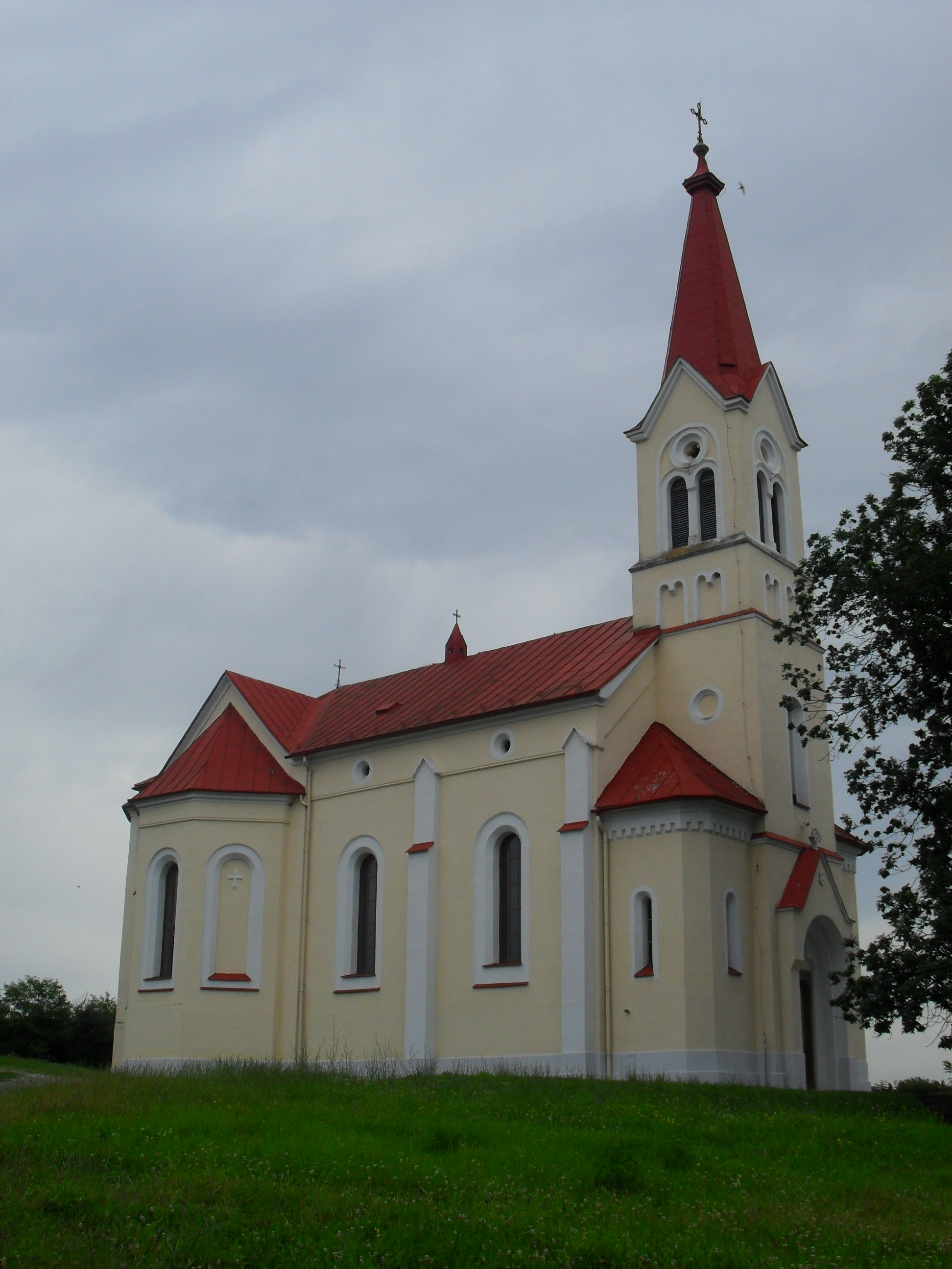 Uzapanyit - katolikus templom